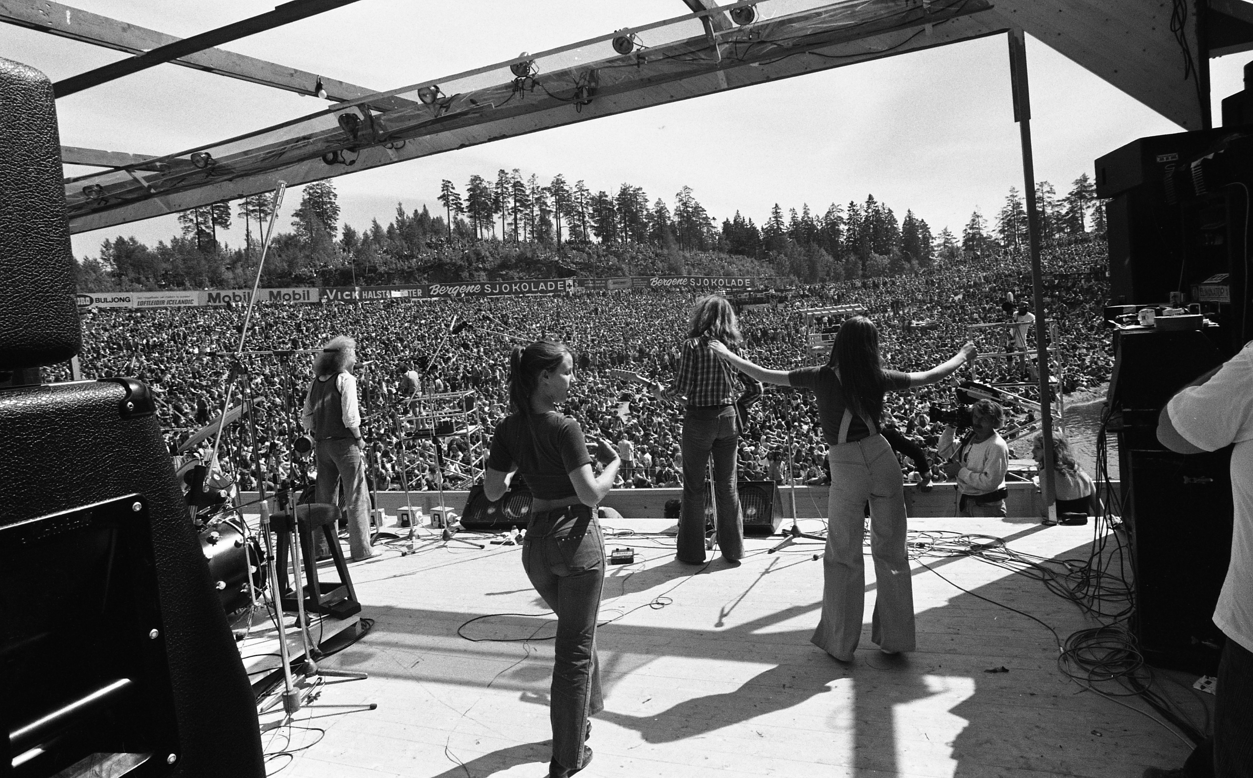 Rockekonsert i Holmenkollen, 17/6-73. Band ukjent. Foto: Lasse Klæboe. Arkivref.: PA-0797_U_7416_001_013